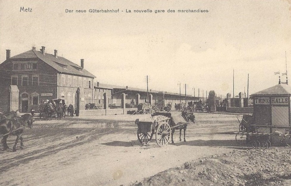 La gare aux marchandises de Metz, construite au début du XXe siècle et désaffectée en 1997. Elle se trouvait à l'emplacement de l'actuel centre Pompidou.